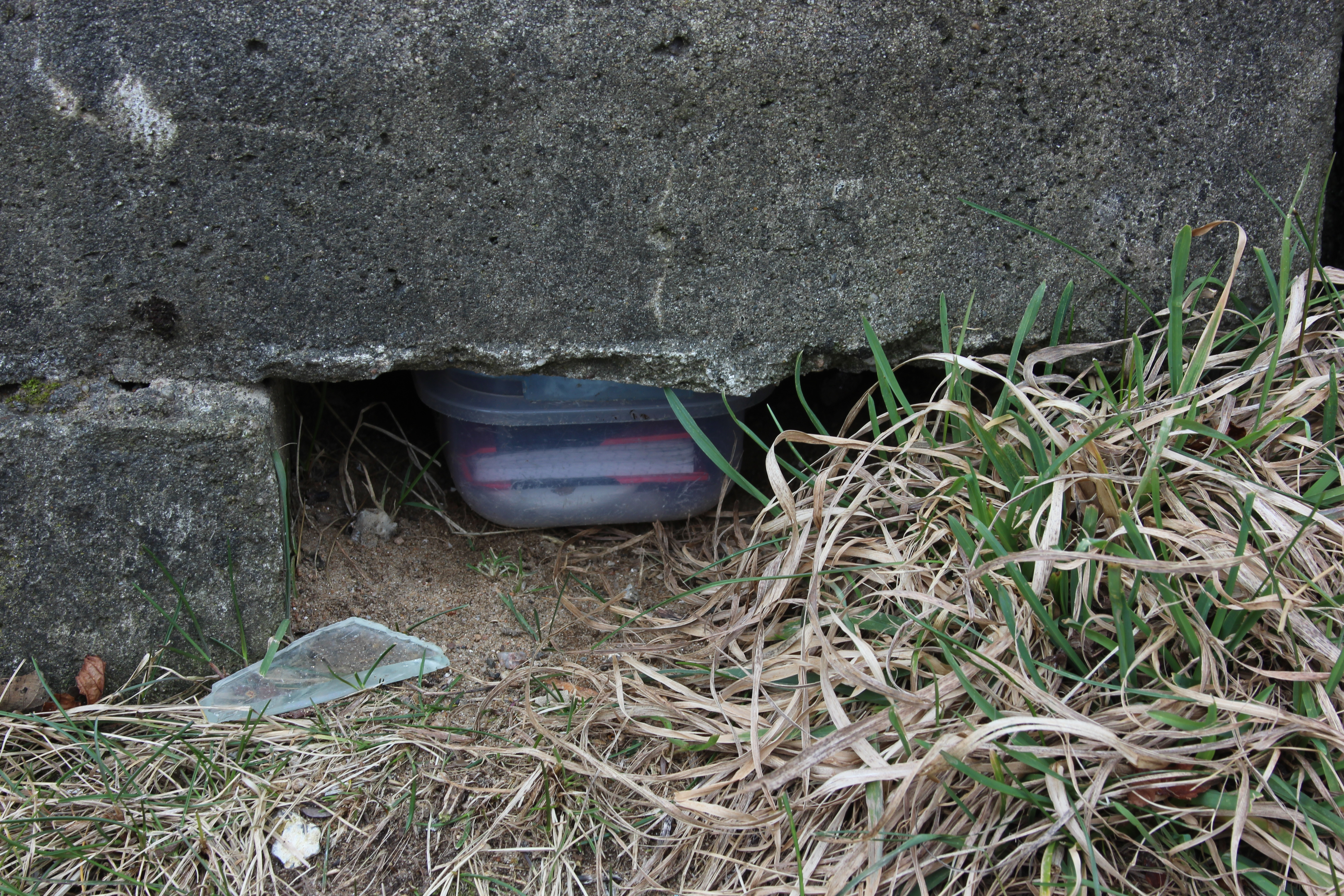 Versteckte Geocach Dose in einem Exwachturm der DDR Grenztruppen